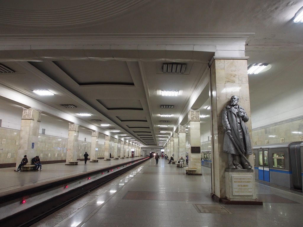 Partizanskaya Metro Station